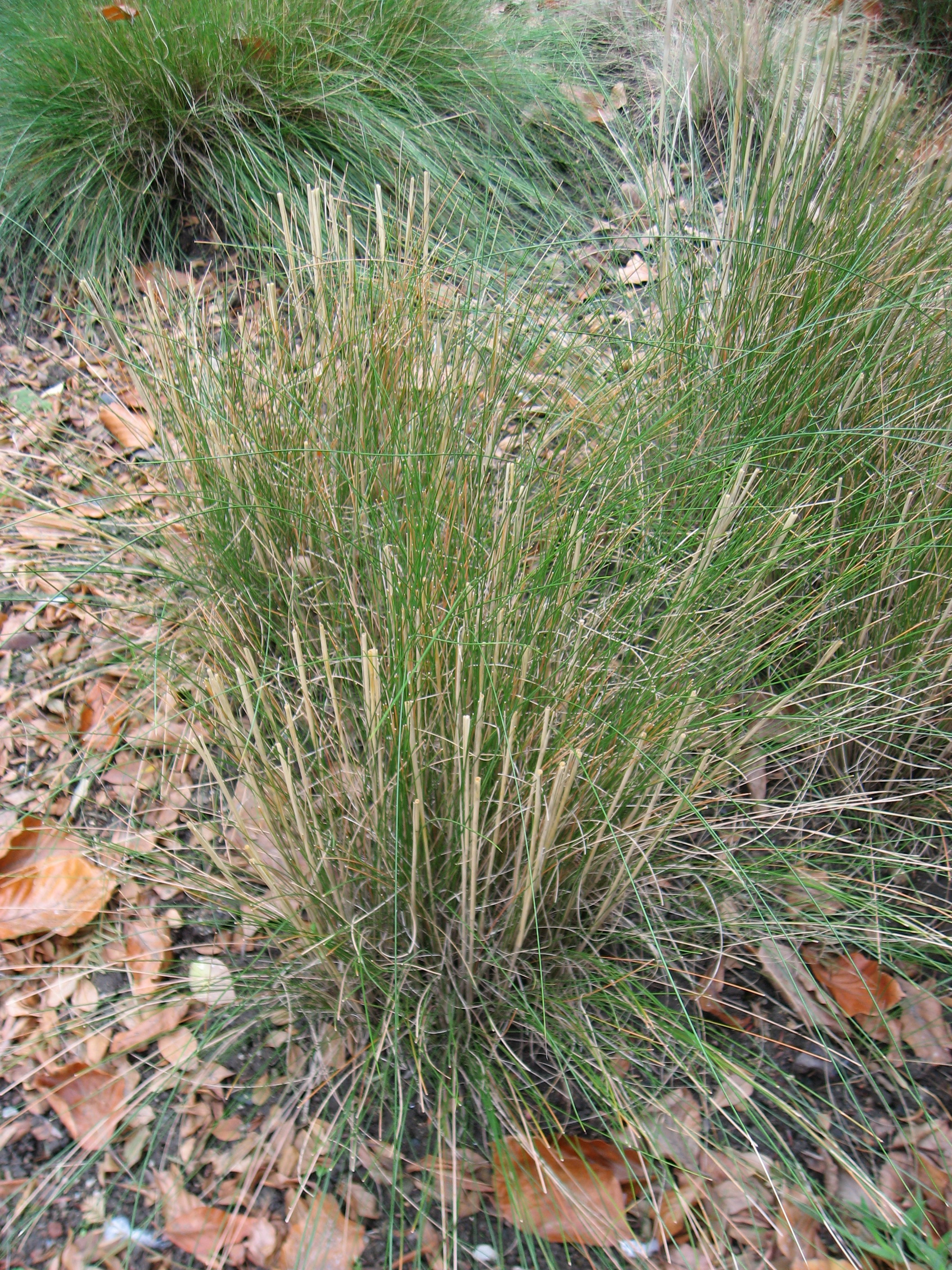 Kavyl tenkolistý